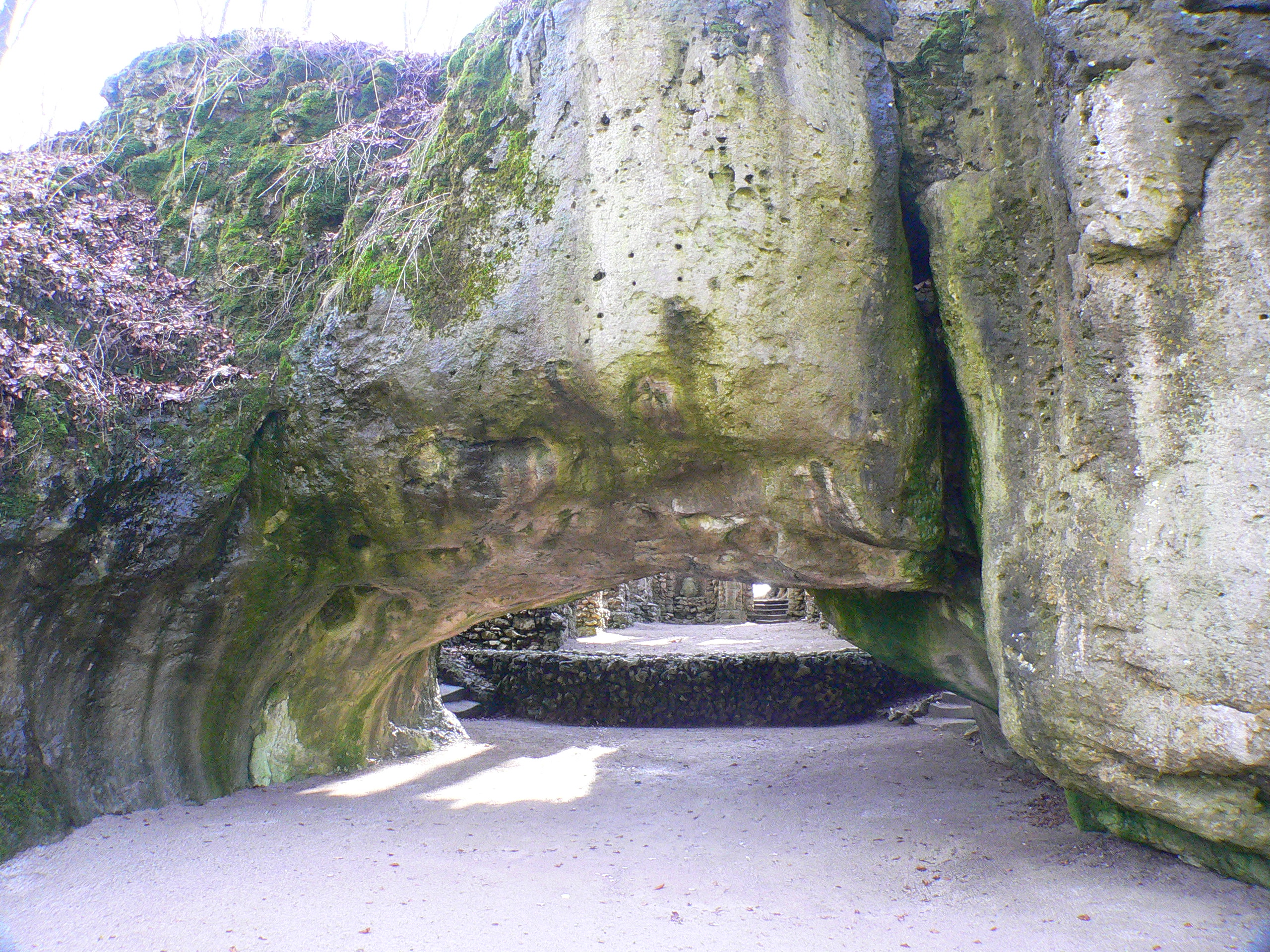 Felsengarten Sanspareil, Grotte der Calypso - Fränkische Schweiz, Bayern